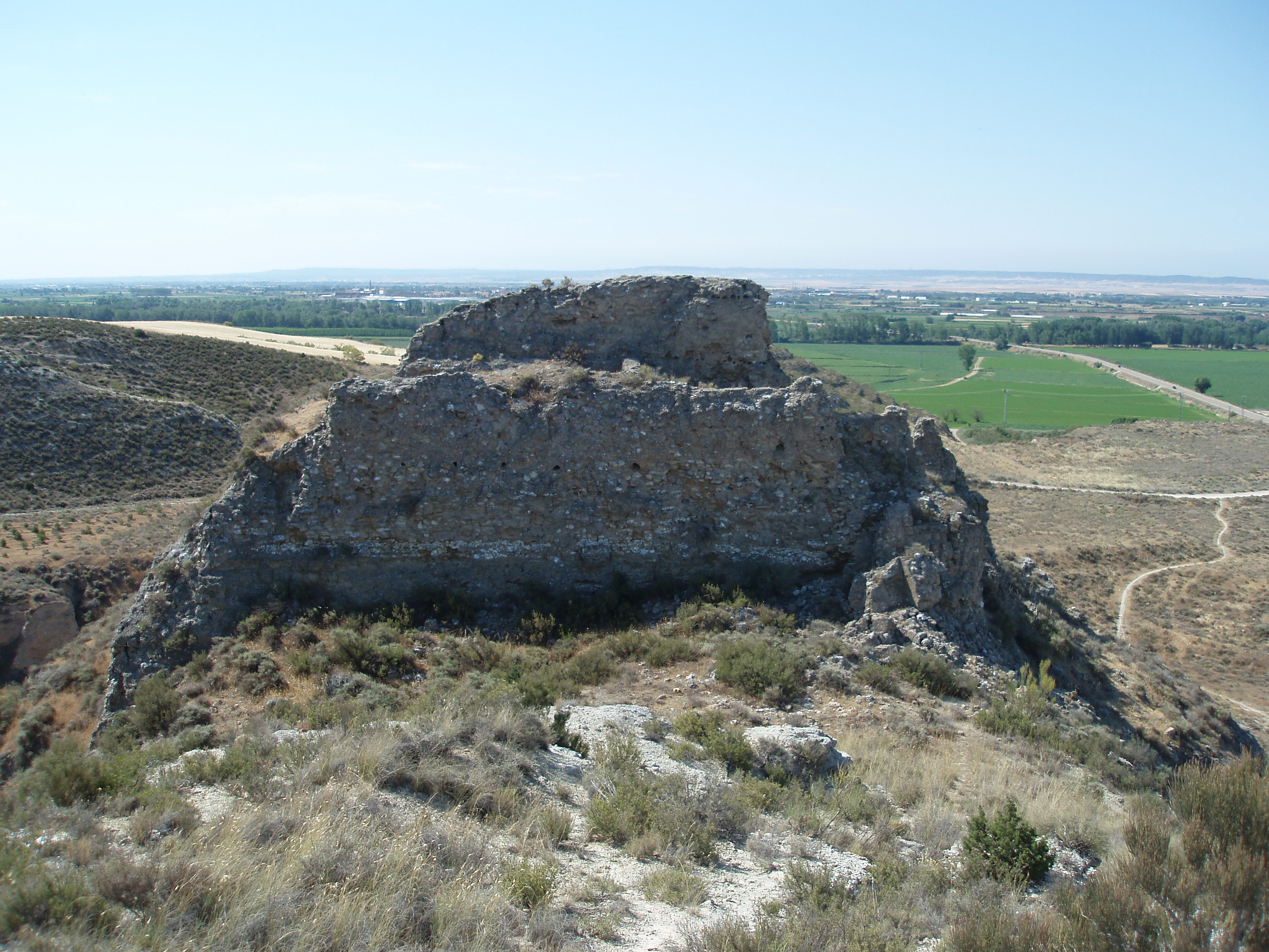 Ruinas del castillo de Pla.